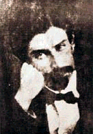 El coronel Eduardo Avaroa Hidalgo (San Pedro de Atacama, 13 de octubre de 1838 - Calama , 23 de marzo de 1879) Uno de los mayores héroes bolivianos de la Guerra del Pacífico (1879-1884), que tuvo como contendientes a Chile por un lado, y a Perú y Bolivia por el otro. Él fue uno de los líderes de la resistencia civil a la invasión durante la Batalla de Topáter.